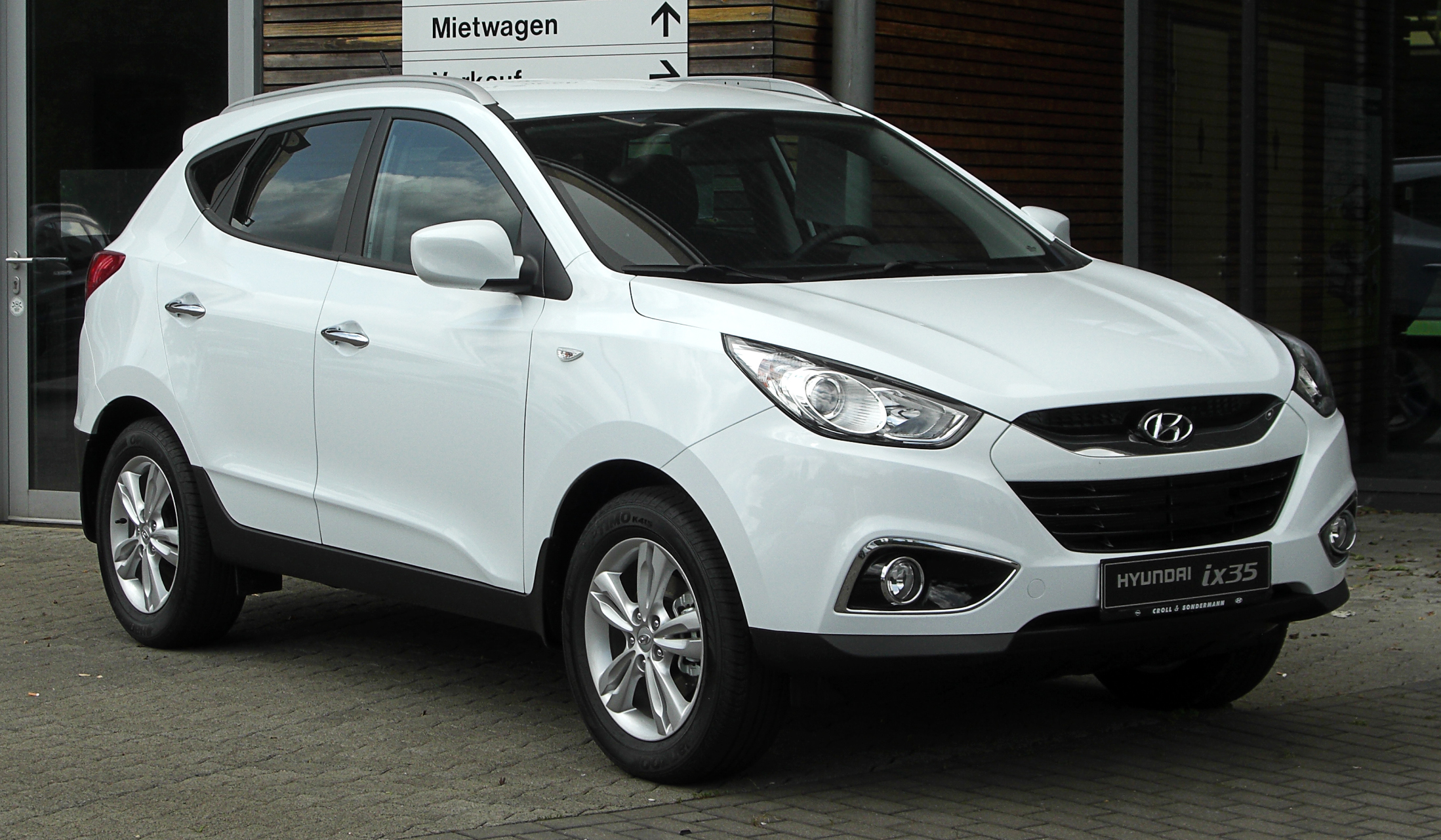 Hyundai ix35 2.0 4WD Premium